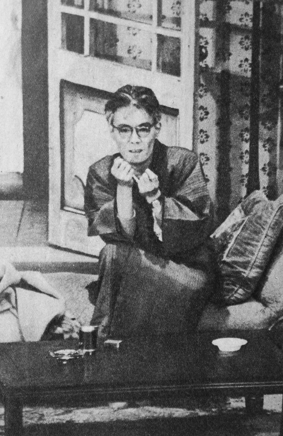 文学座公演『龍を撫でた男』での芥川比呂志